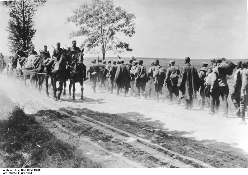 Bespannte Artillerie während des Vormarsches gegen den Feind im Osten. An ihnen vorüber ziehen die geschlagenen sowjetischen Gefangenen. PK-Wette-Scherl 28.6.1941 [Herausgabedatum] 6375-41